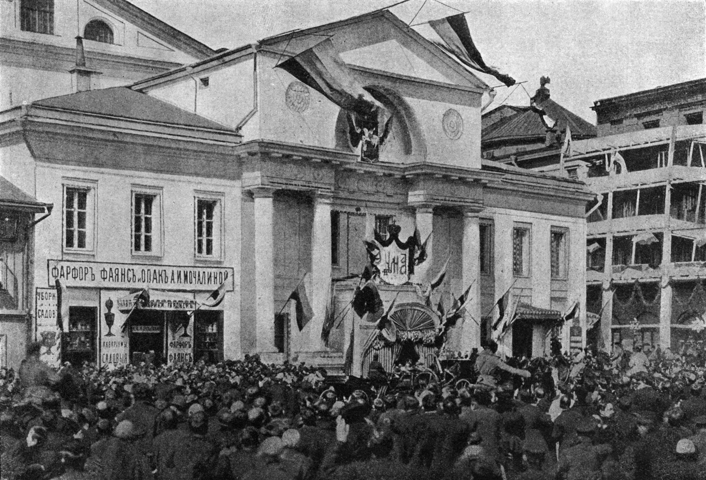 Прибытие Их Величеств к зданию Российского Благородного Собрания на завтрак от дворян 11 апреля 1900 года (по ст. стилю)